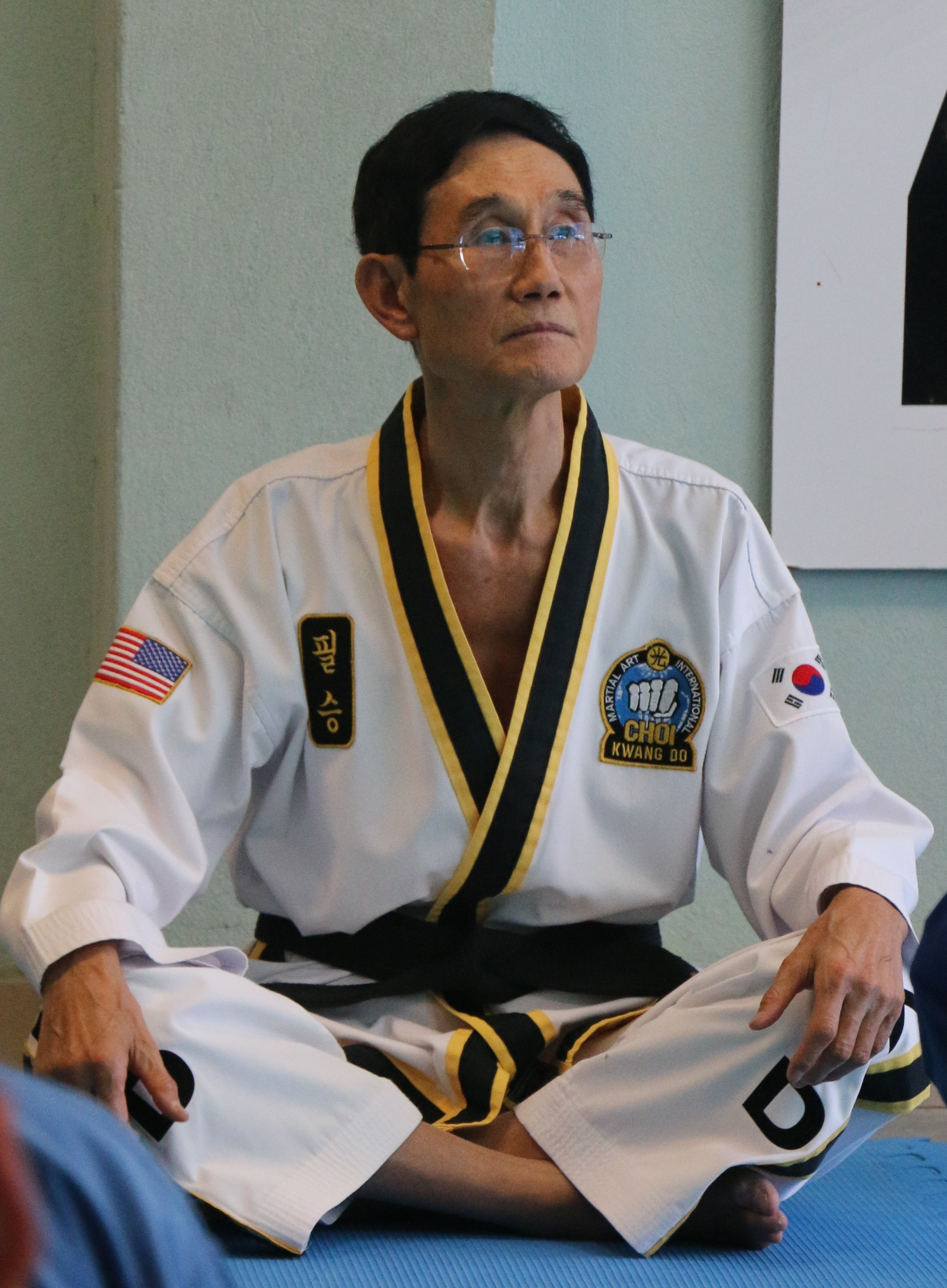 Grand Master Kwang Jo Choi en 2014